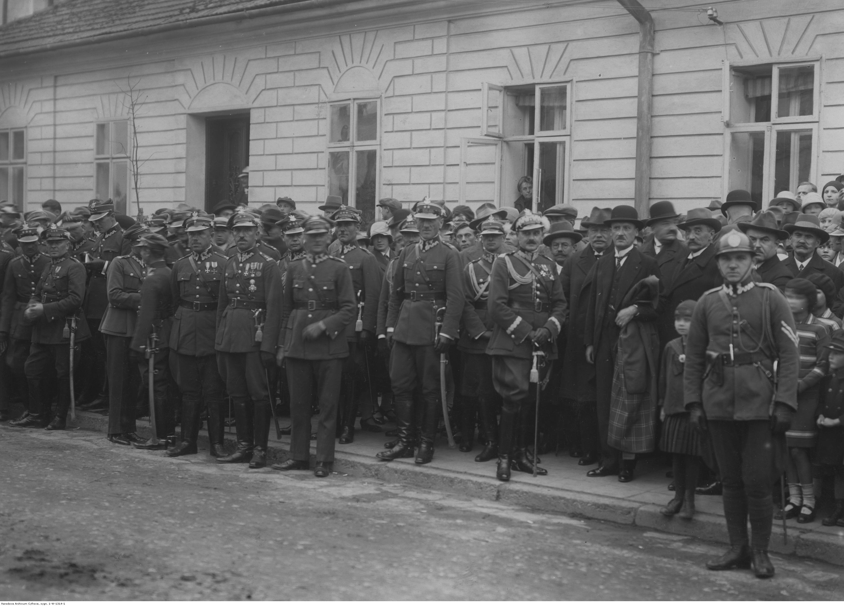 Święto 2 Pułku Strzelców Podhalańskich w Sanoku - grupa oficerów odbierająca defiladę przed Apteką Kawskich; 1928 r. Widoczny m.in. gen. Stanisław Wieroński (oparty na szabli), po jego prawej ppłk Eugeniusz Zuger (przy szabli). Koncern Ilustrowany Kurier Codzienny - Archiwum Ilustracji. Sygnatura: 1-W-1314-1